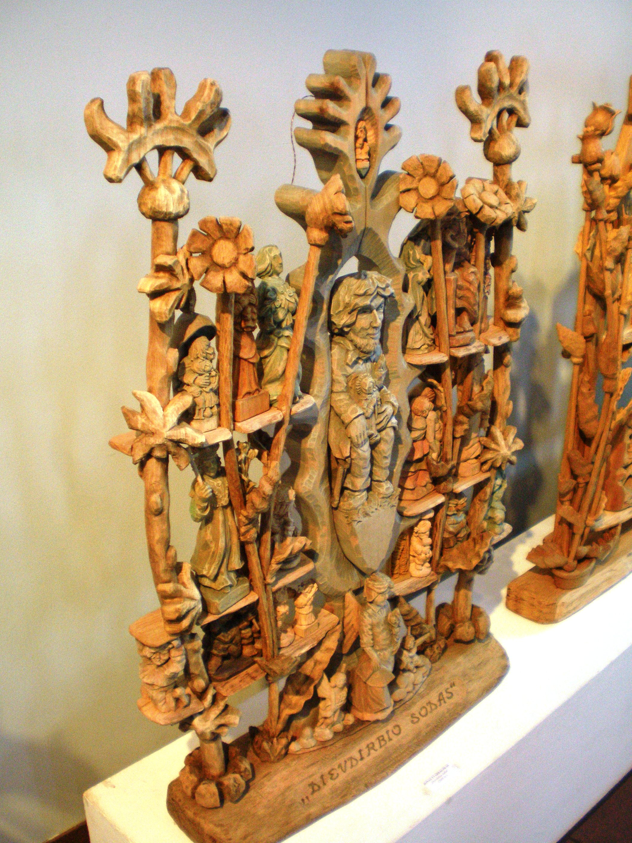 Medžio raižybos darbas "Dievdirbio sodas"